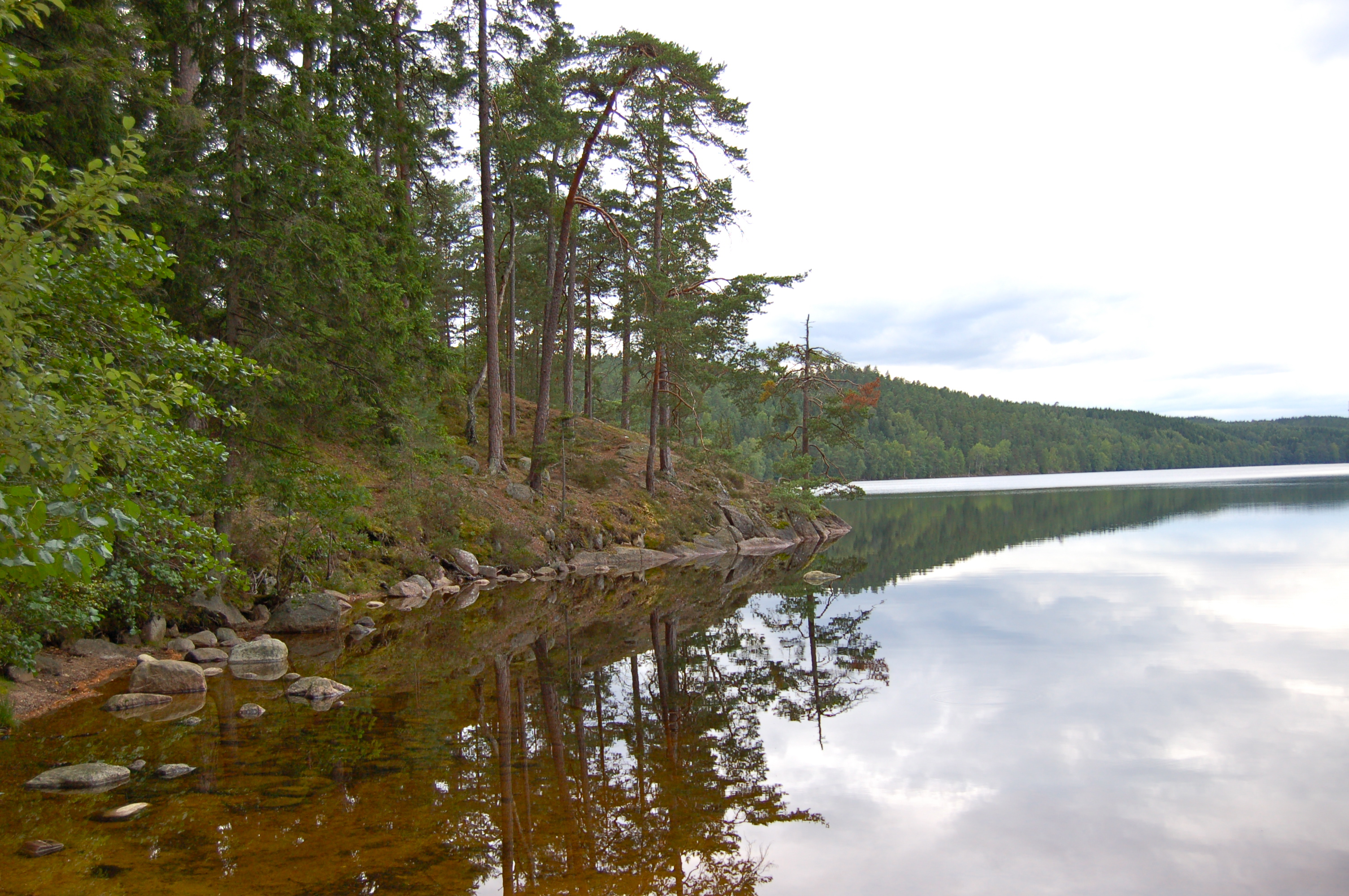 Ågelsjön, vy mot väster. Kamera: Nikon D50, se Metadata för utförlig information.